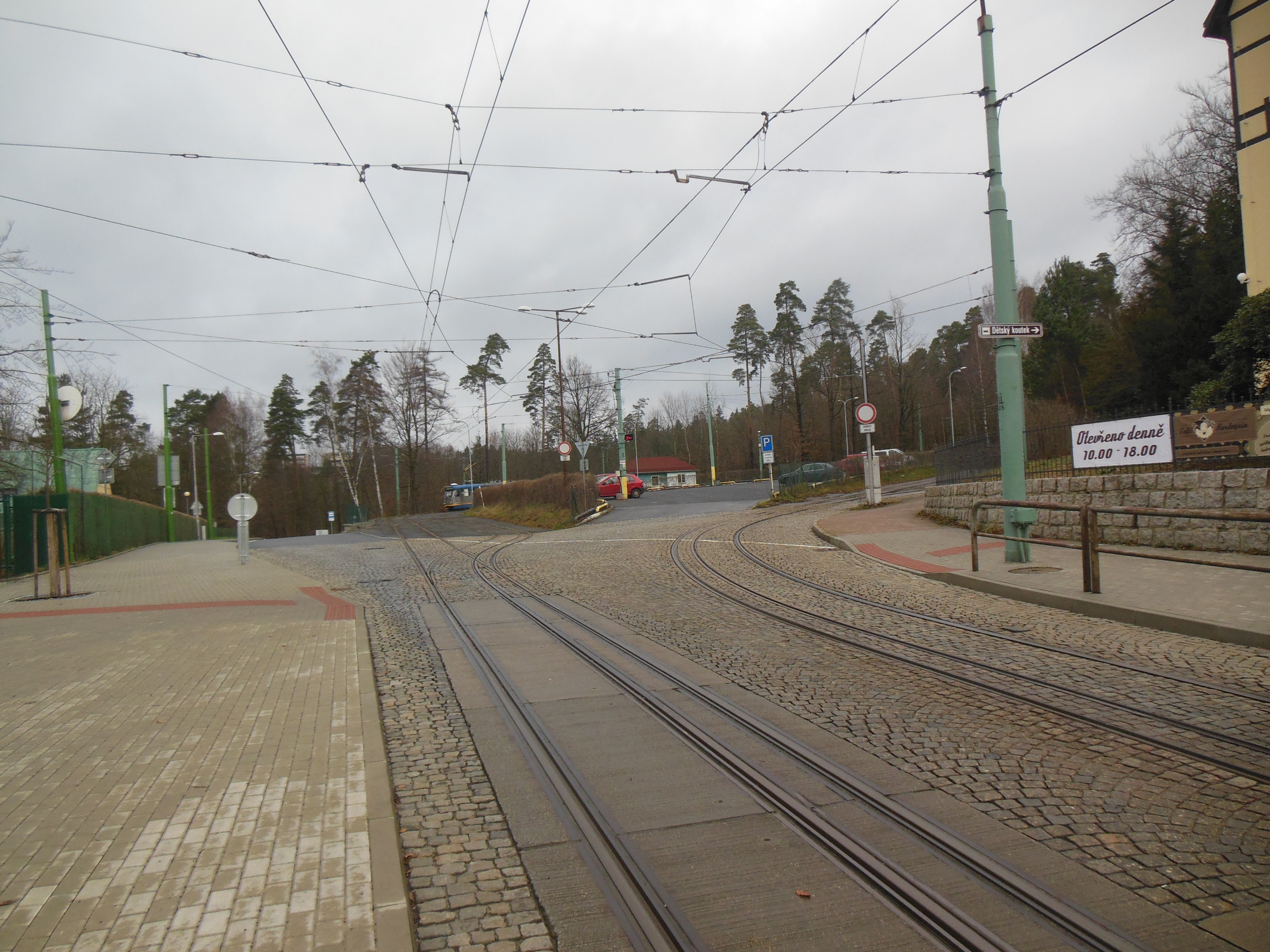 Liberec (okres Liberec). Ulice Sovova, tramvajová smyčka.